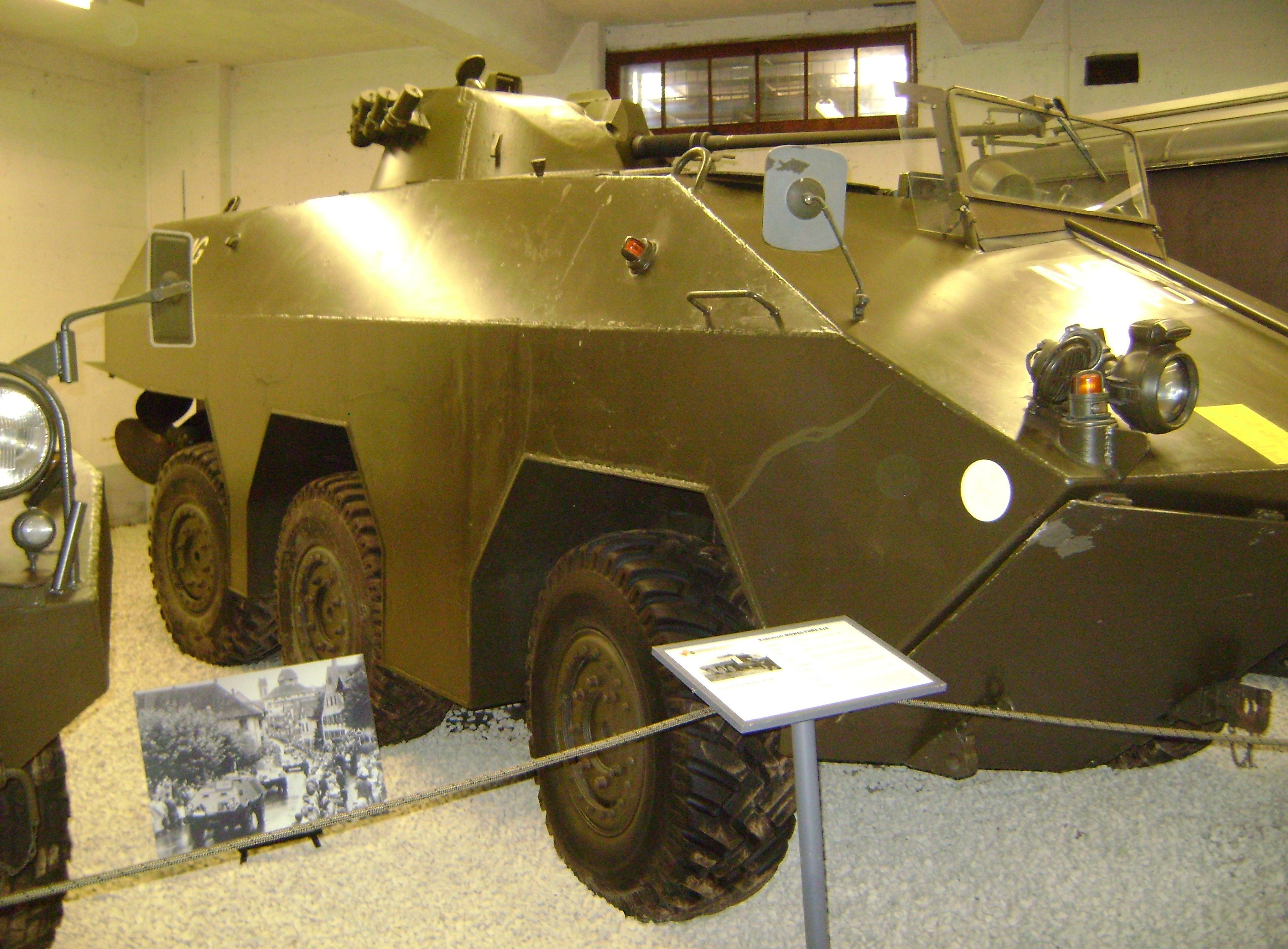 MOWAG Puma Seite